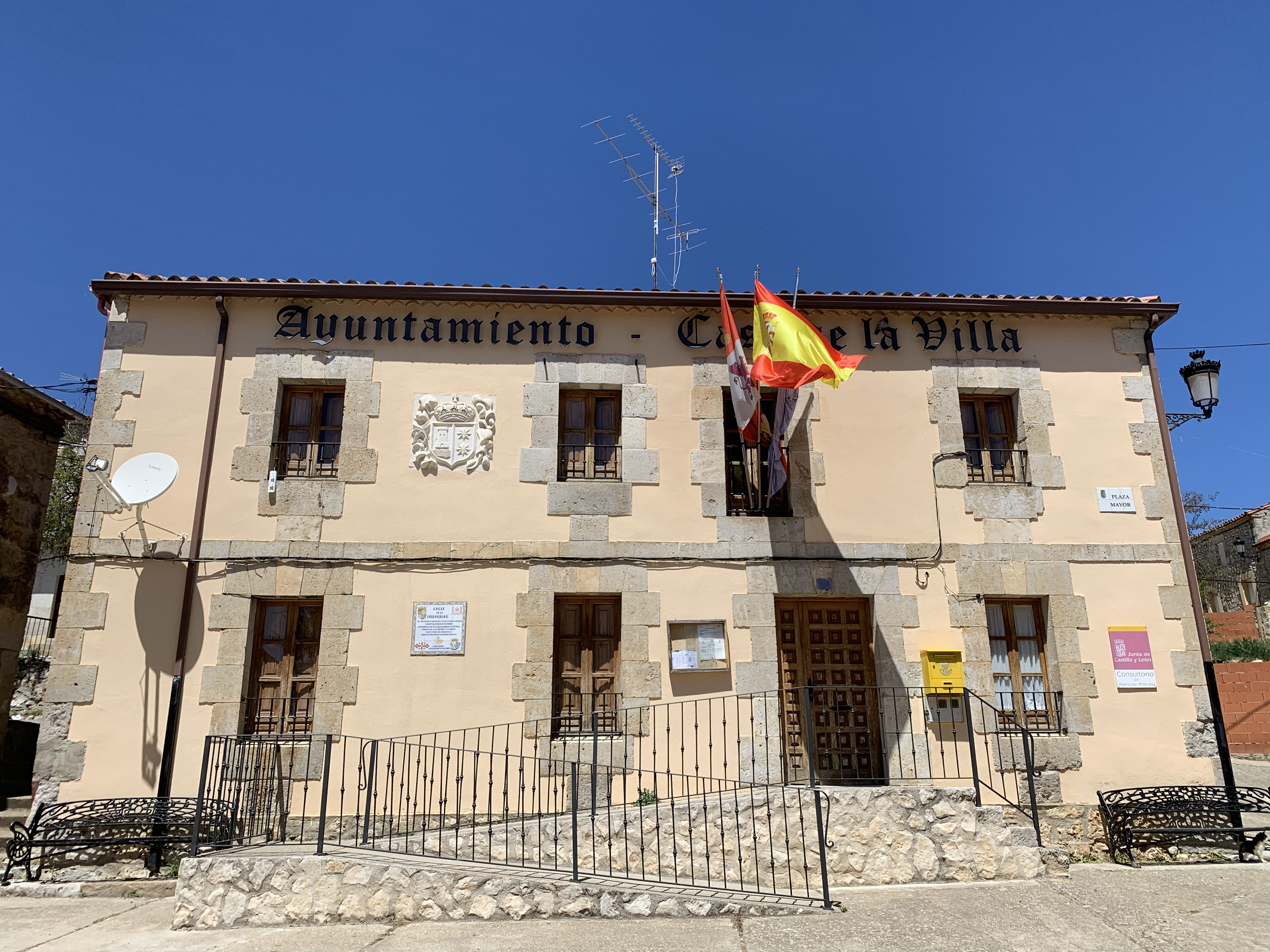 Ayuntamiento de Santa María del Mercadillo